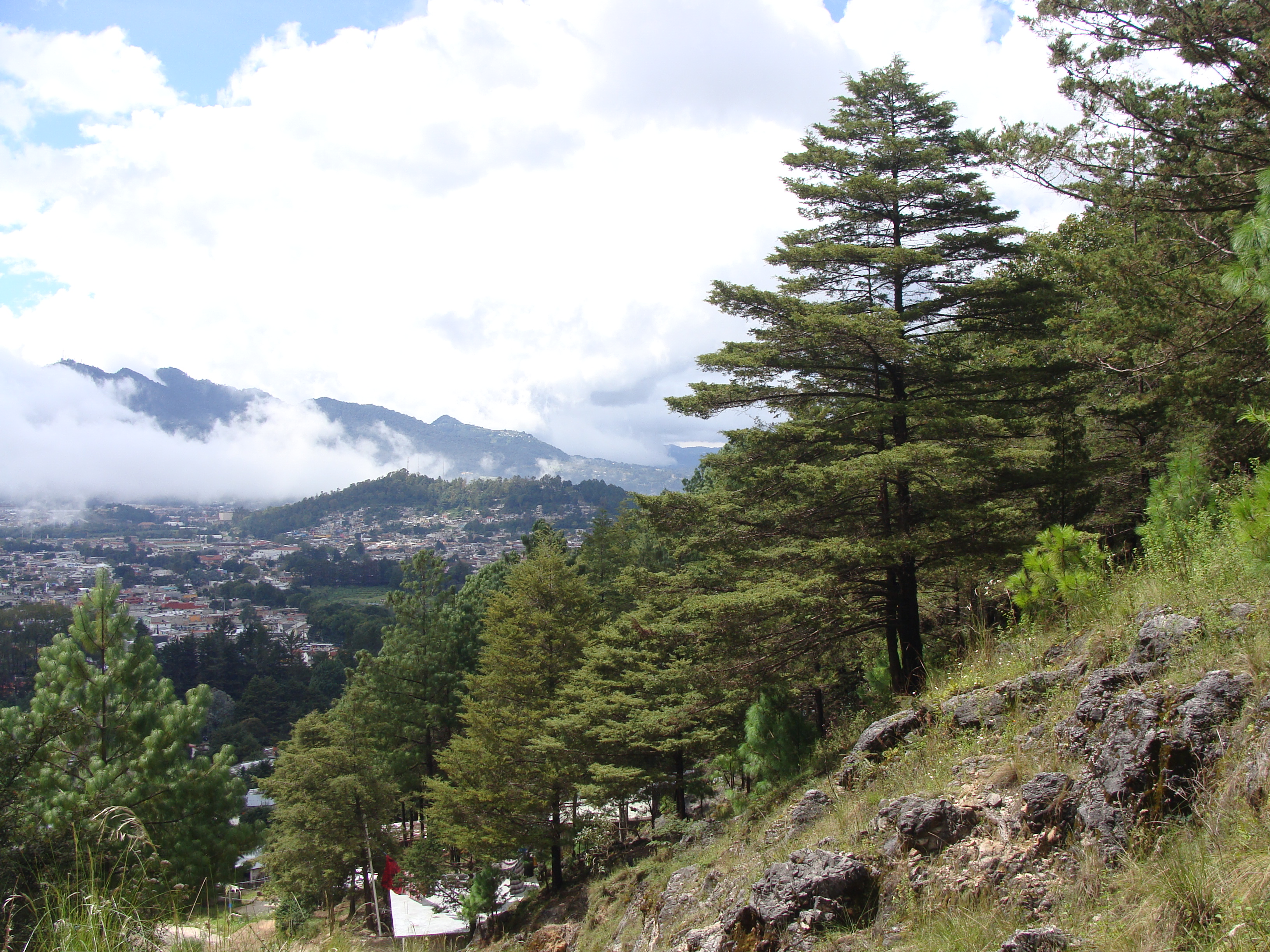 este es una toma de los alrededores de jovel como tambien se le llama san cristobal de las casas